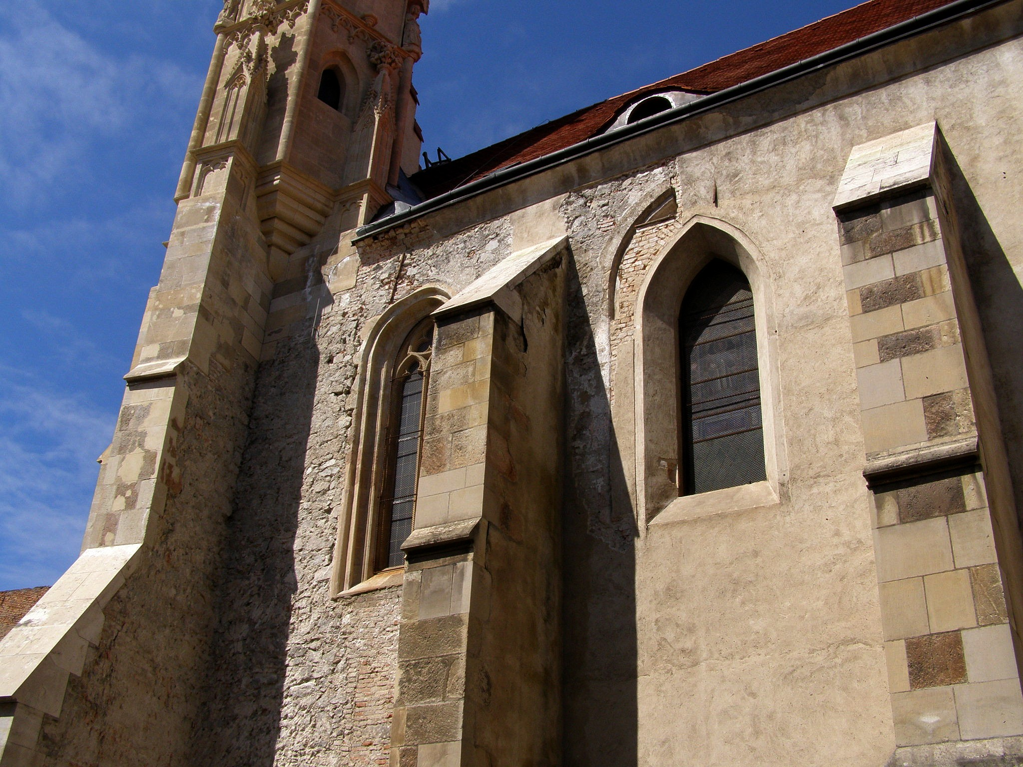 Detail oporného systému južného múru kostola klarisiek